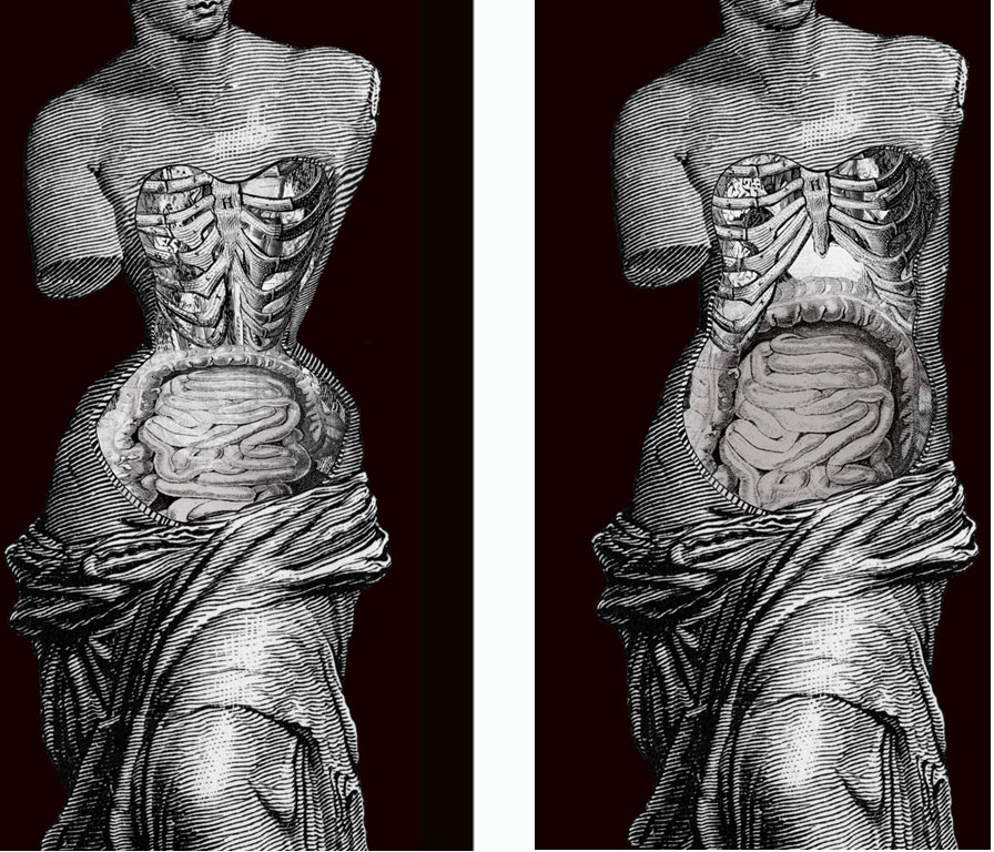 Imatges de l'exposició permanent "La Ciutat Viscuda". Realitzades per Andrés Marín Jarque a partir de 2011, any d'inauguració de l'exposició.